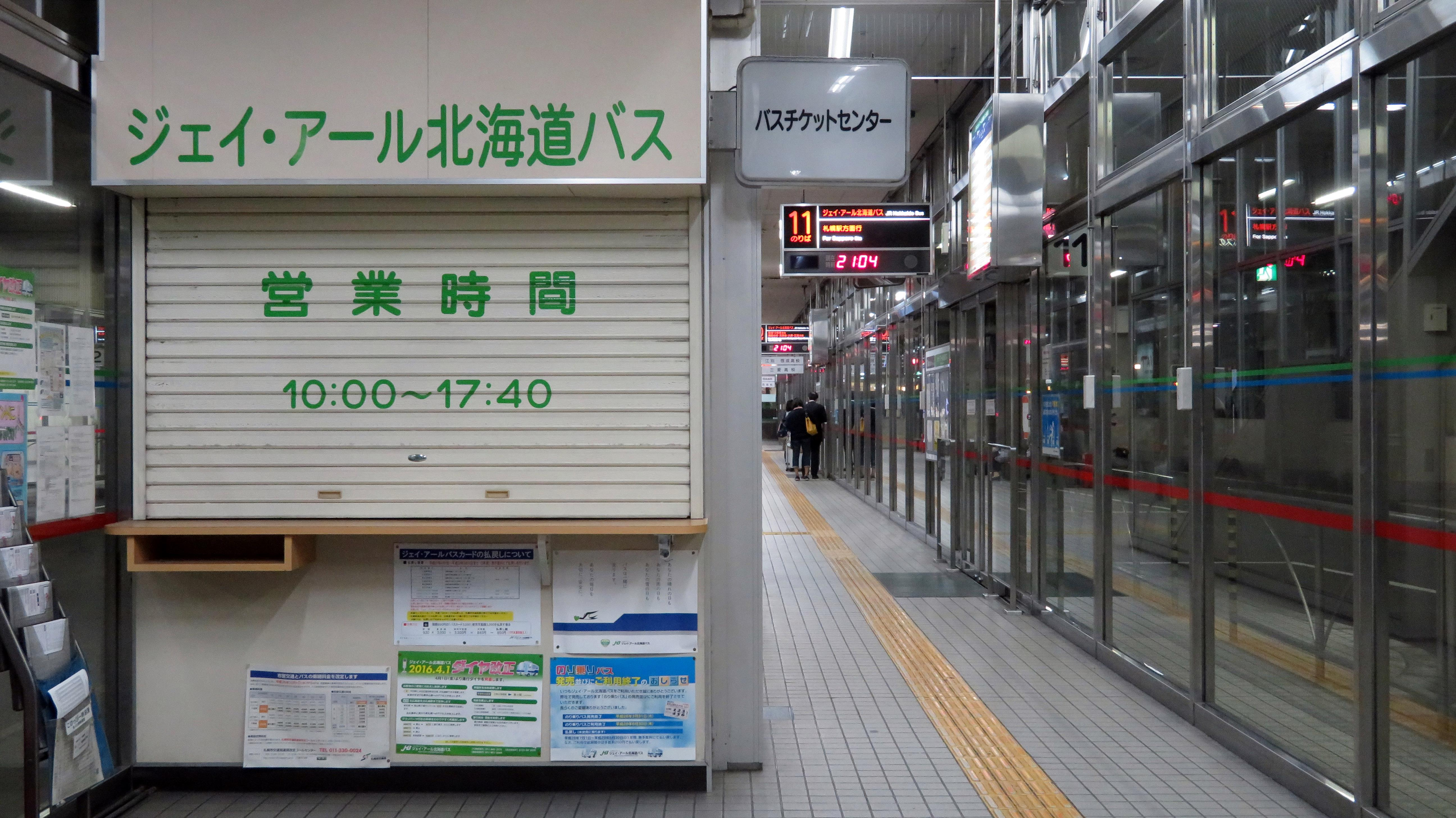 新札幌バスターミナル（北レーン） Canon PowerShot SX720 HS